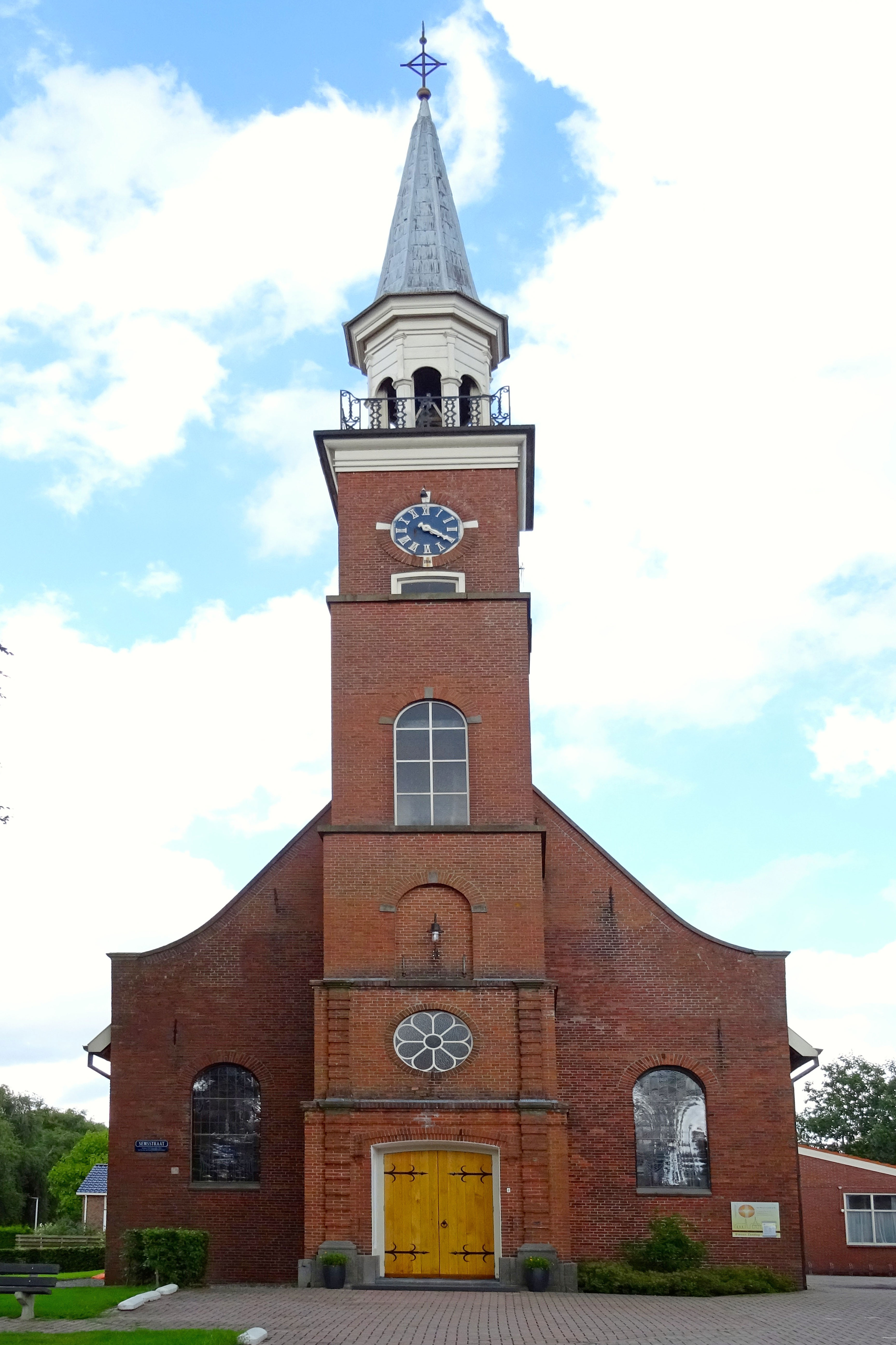 Semstraatkerk in Stadskanaal